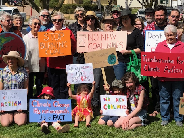 Tumbarumba